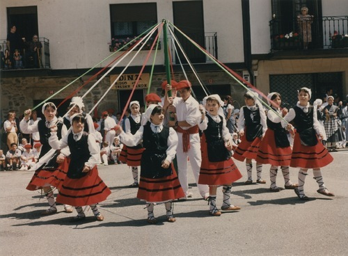 Zinta-dantza Antzuolan.